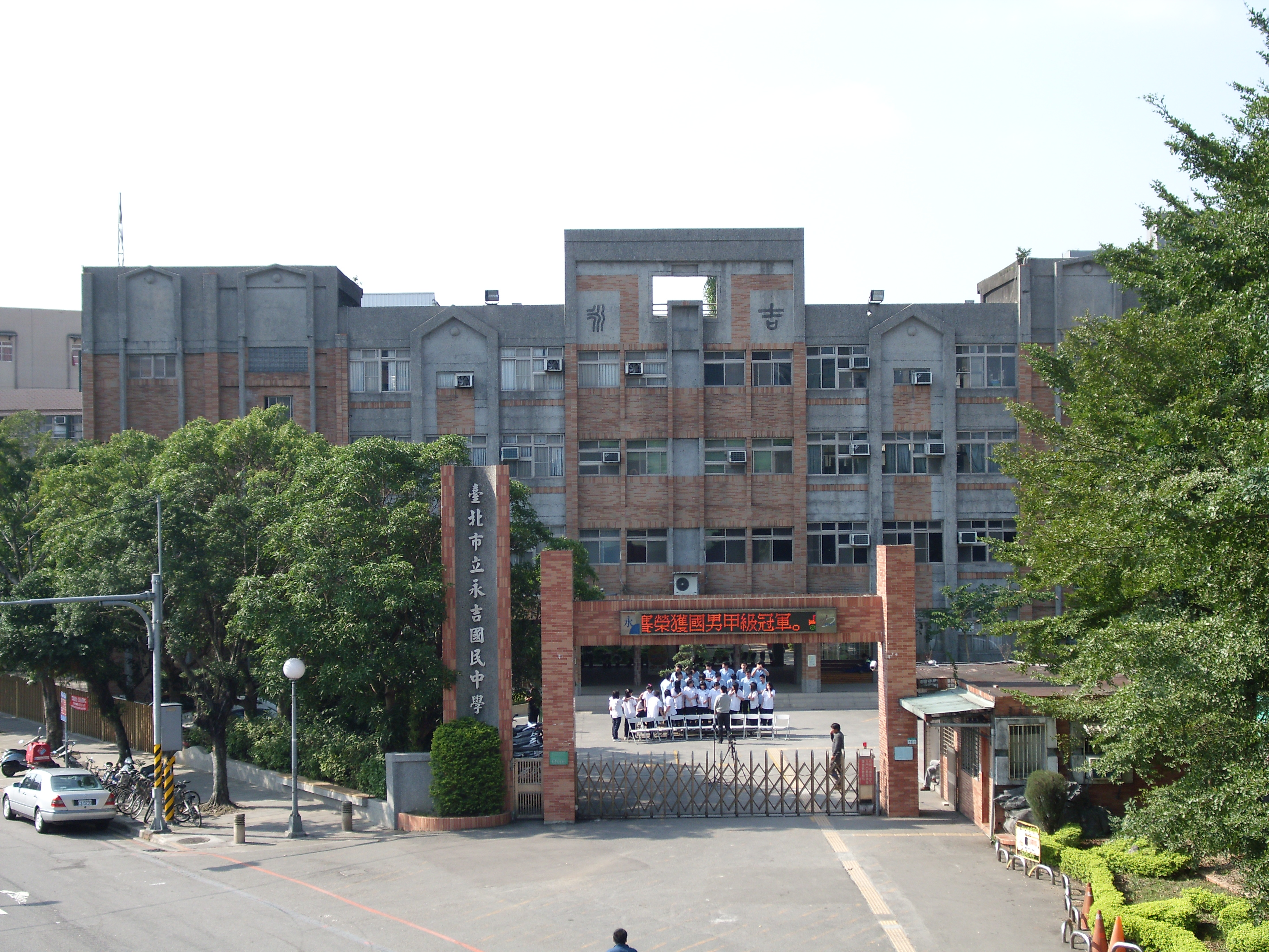 臺北市立永吉國民中學